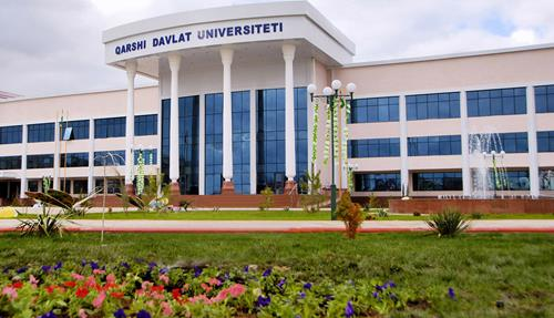 Oʻzbekcha/ўзбекча: Qarshi davlat universiteti